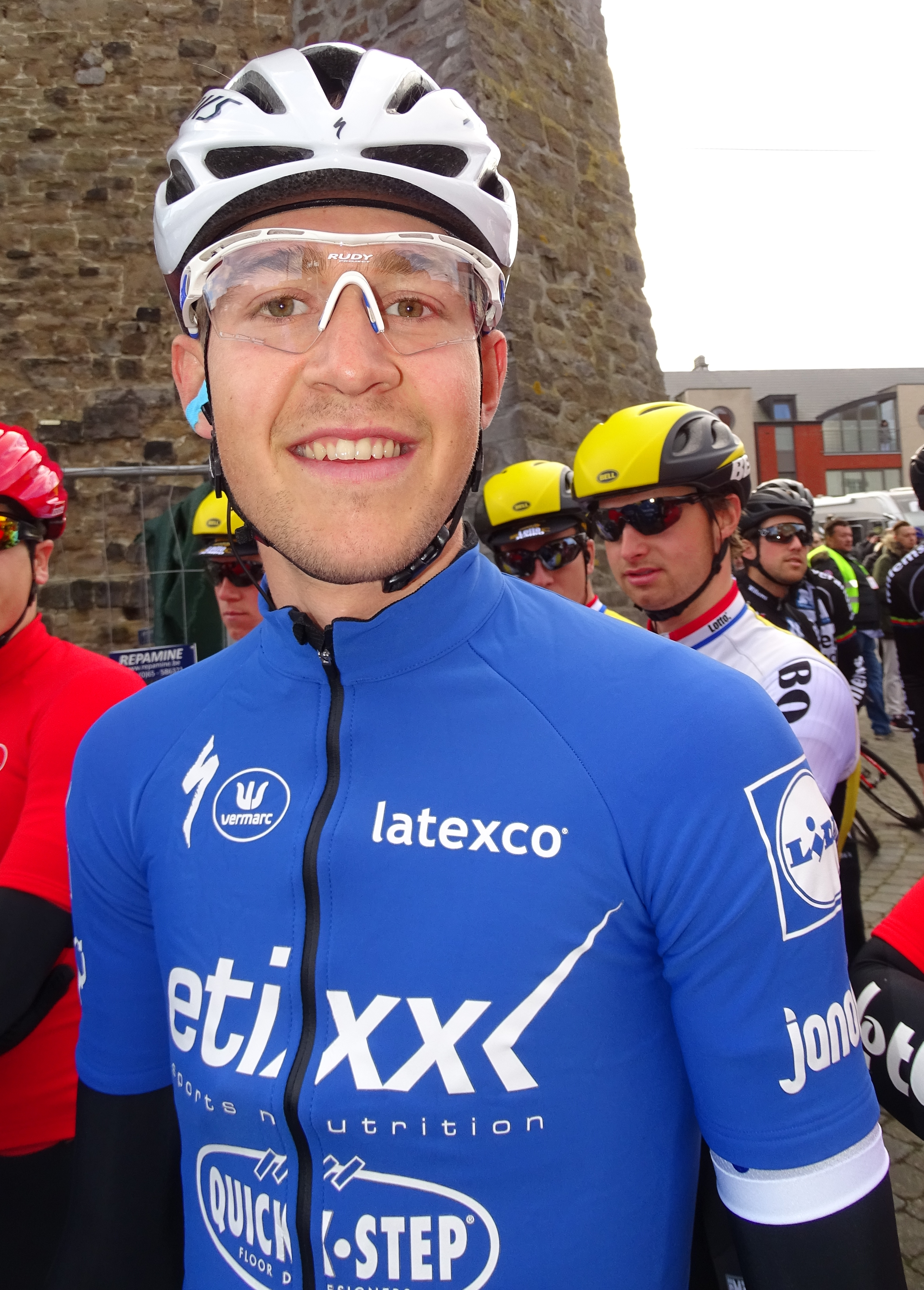 Reportage réalisé le mercredi 2 mars à l'occasion du départ du Samyn des Dames 2016 et du Samyn 2016 à Quaregnon, Belgique.